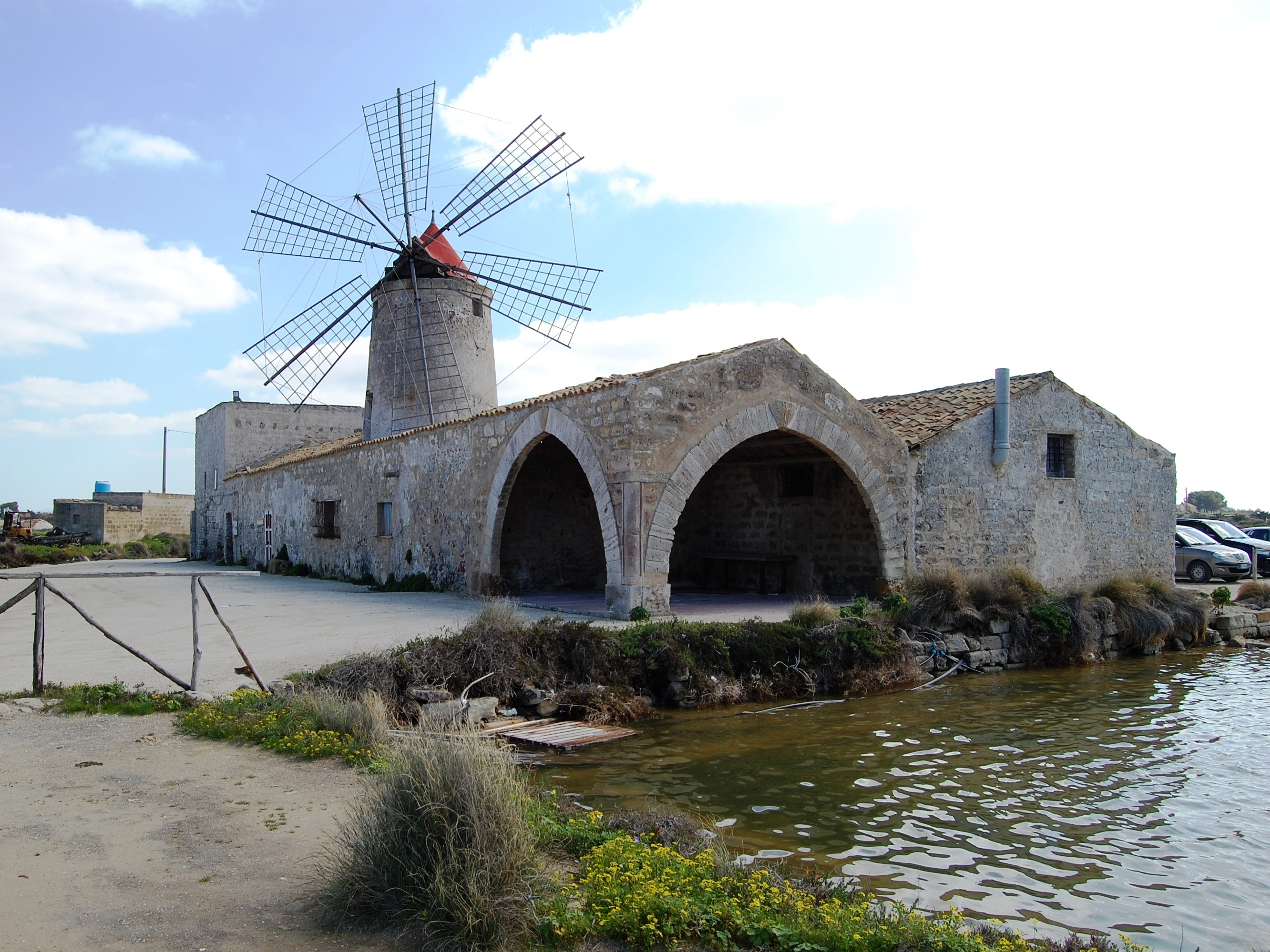 Riserva naturale Saline di Trapani, Sicily Museo del sale